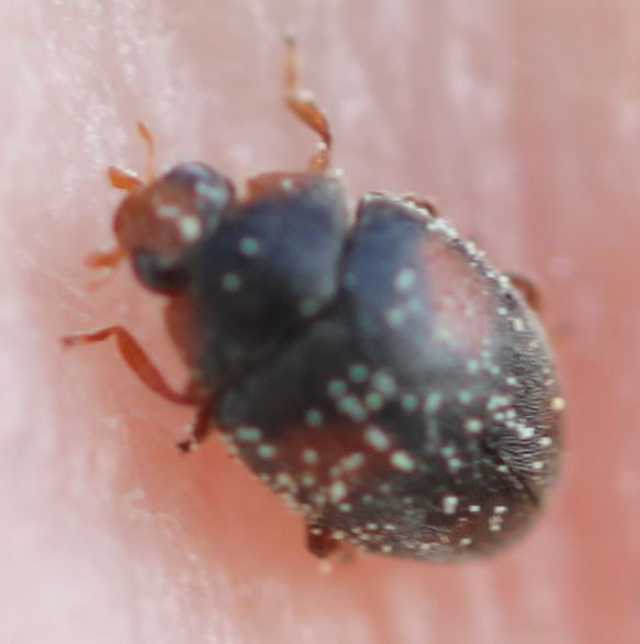 Trockenrasen-Zwergmarienkäfer (Scymnus frontalis) am 9. Mai 2018 südlich von Mannheim